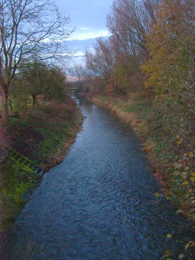 Die Angel bei Wolbeck